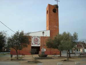 Vista de la Plaza, Iglesia y fuente.